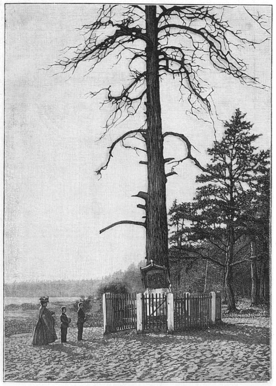 Сосна близ селения Лахты, на берегу Финского залива — памятник подвига Петра I в ноябре 1724 г., у которой предположено соорудить часовню (1892 г.).